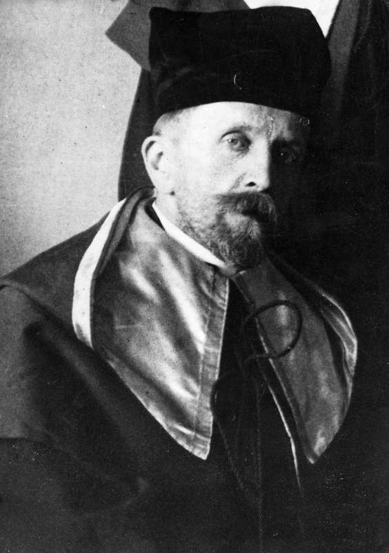 Fotografia portretowa w uroczystym stroju akademickim.